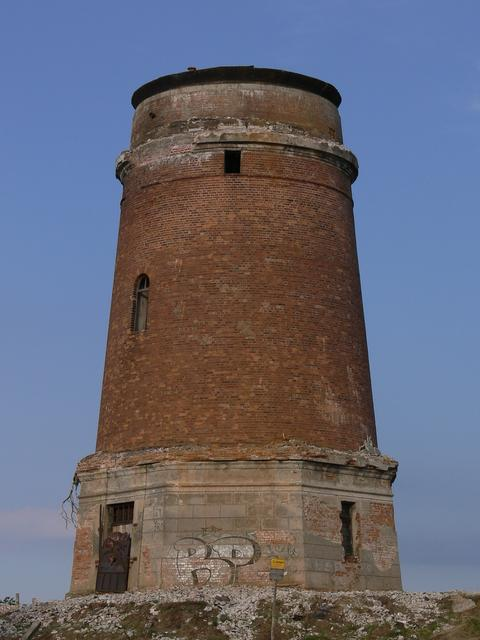 Brodnicka Wieża Ciśnień od strony zachodniej po demontażu górnej części. 20 lipca 2006.